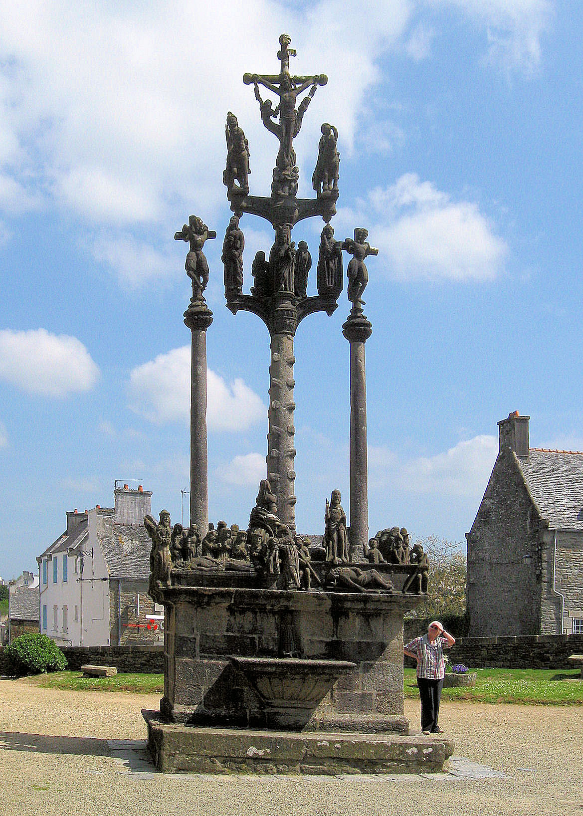 Saint Thegonnec, Finistere, Bretagne